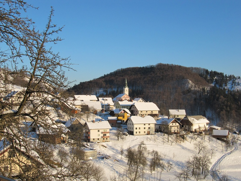 Leskovica pozimi